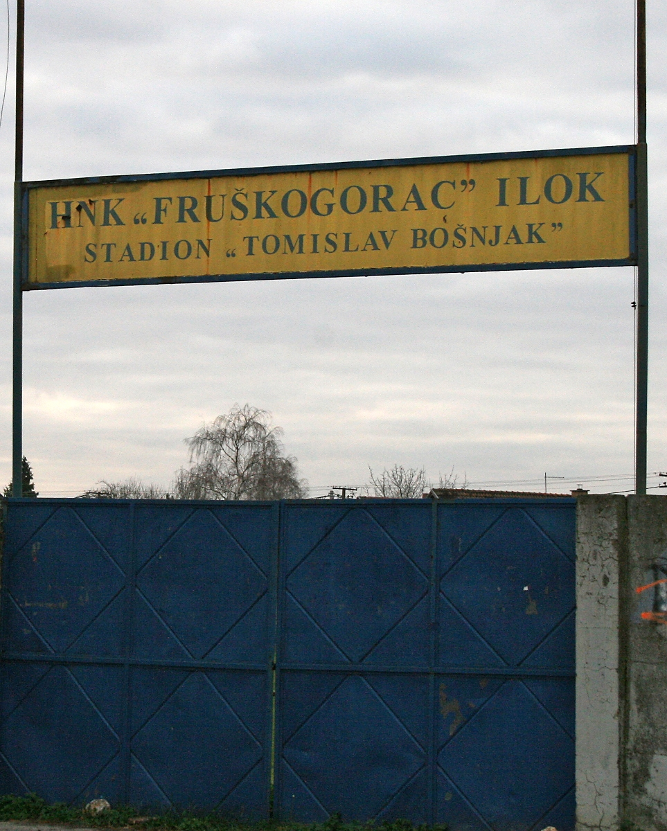 Ulaz na igralište HNK Fruškogorac u Iloku